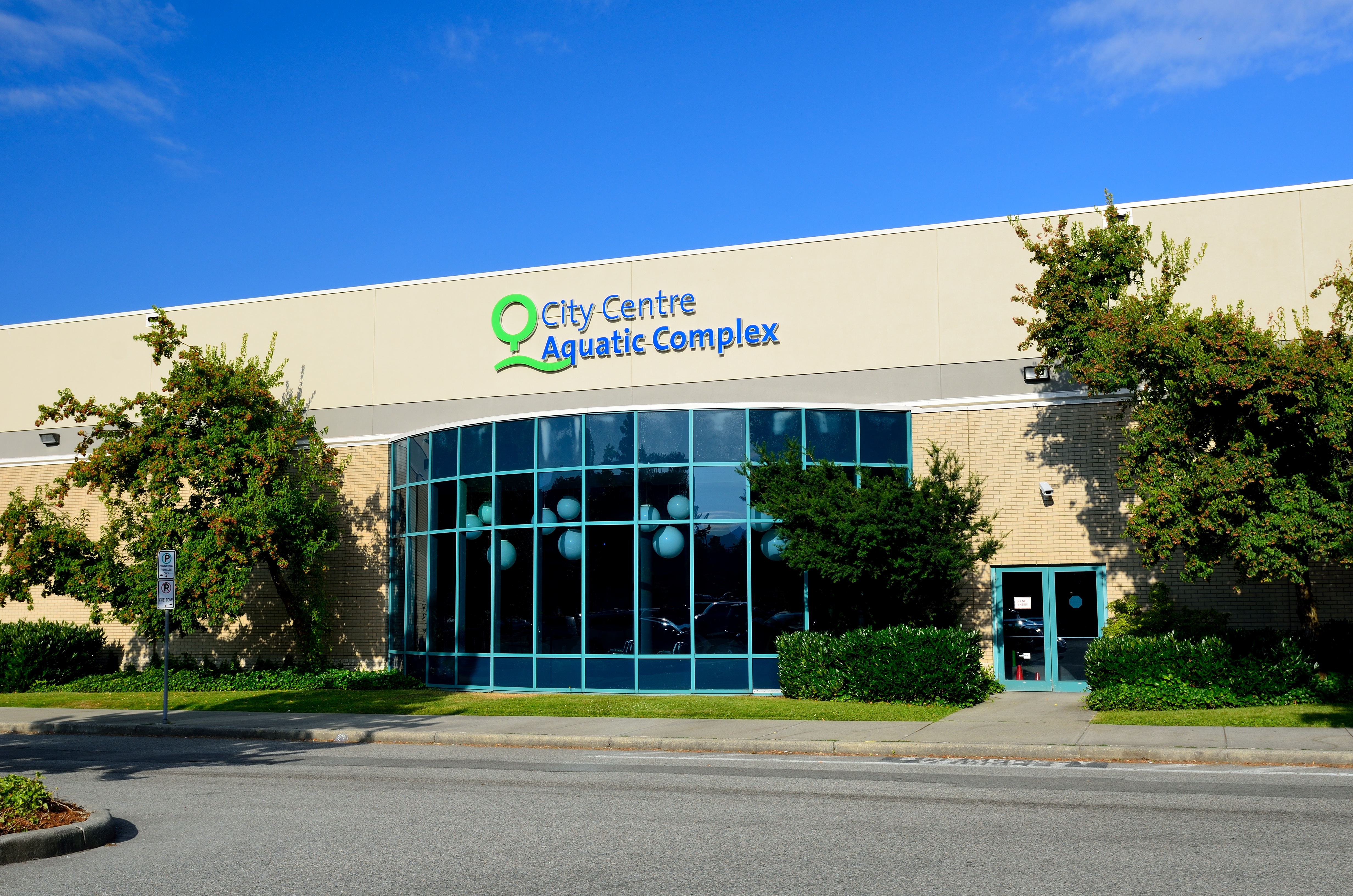 Coquitlam Aquatic Centre